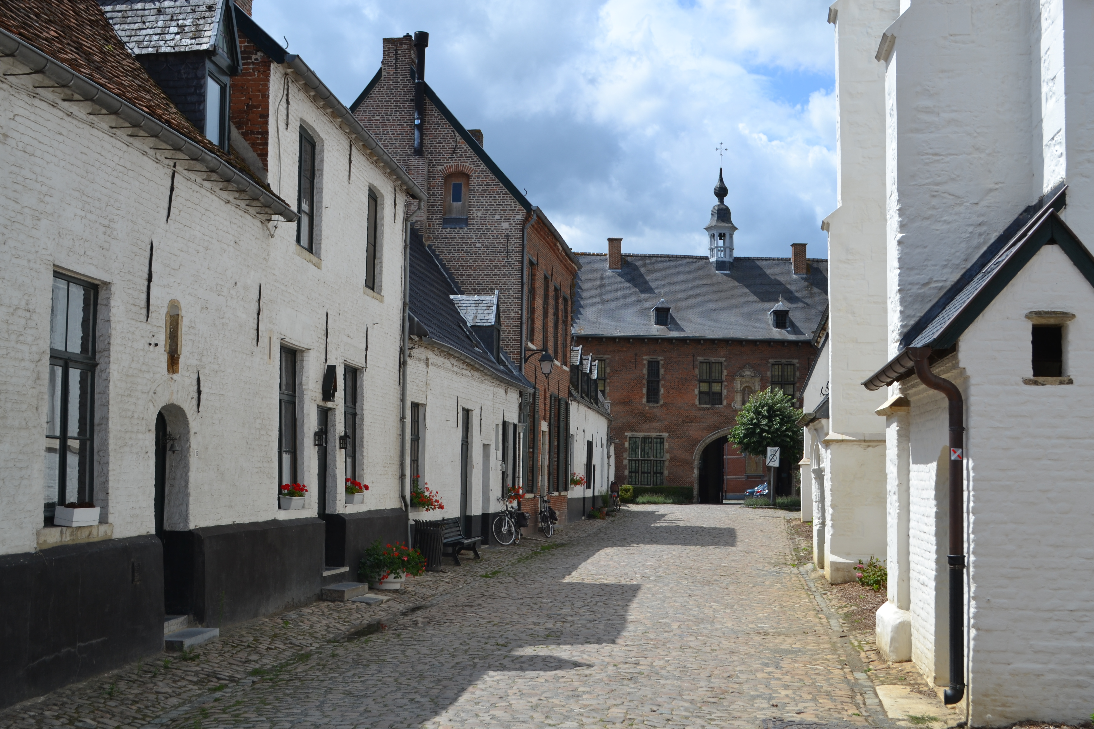 Бегінхоф